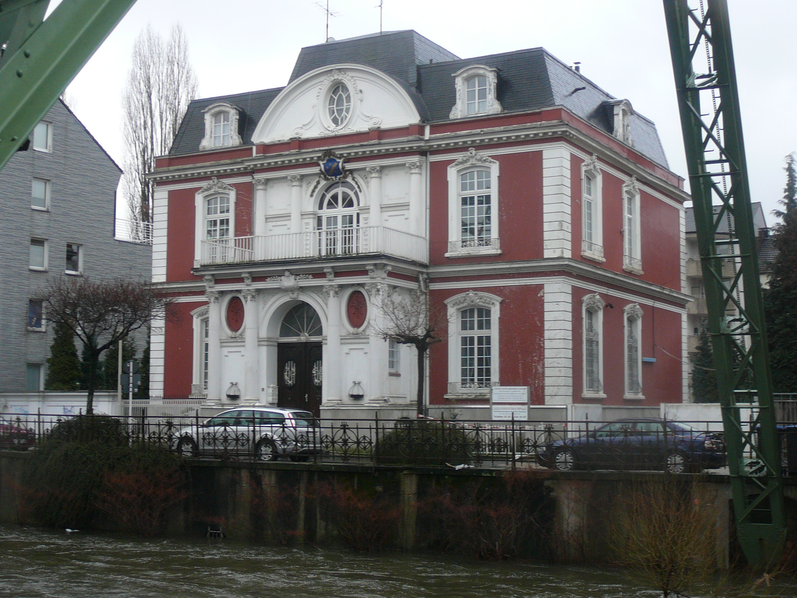 Berliner Straße, Wuppertal